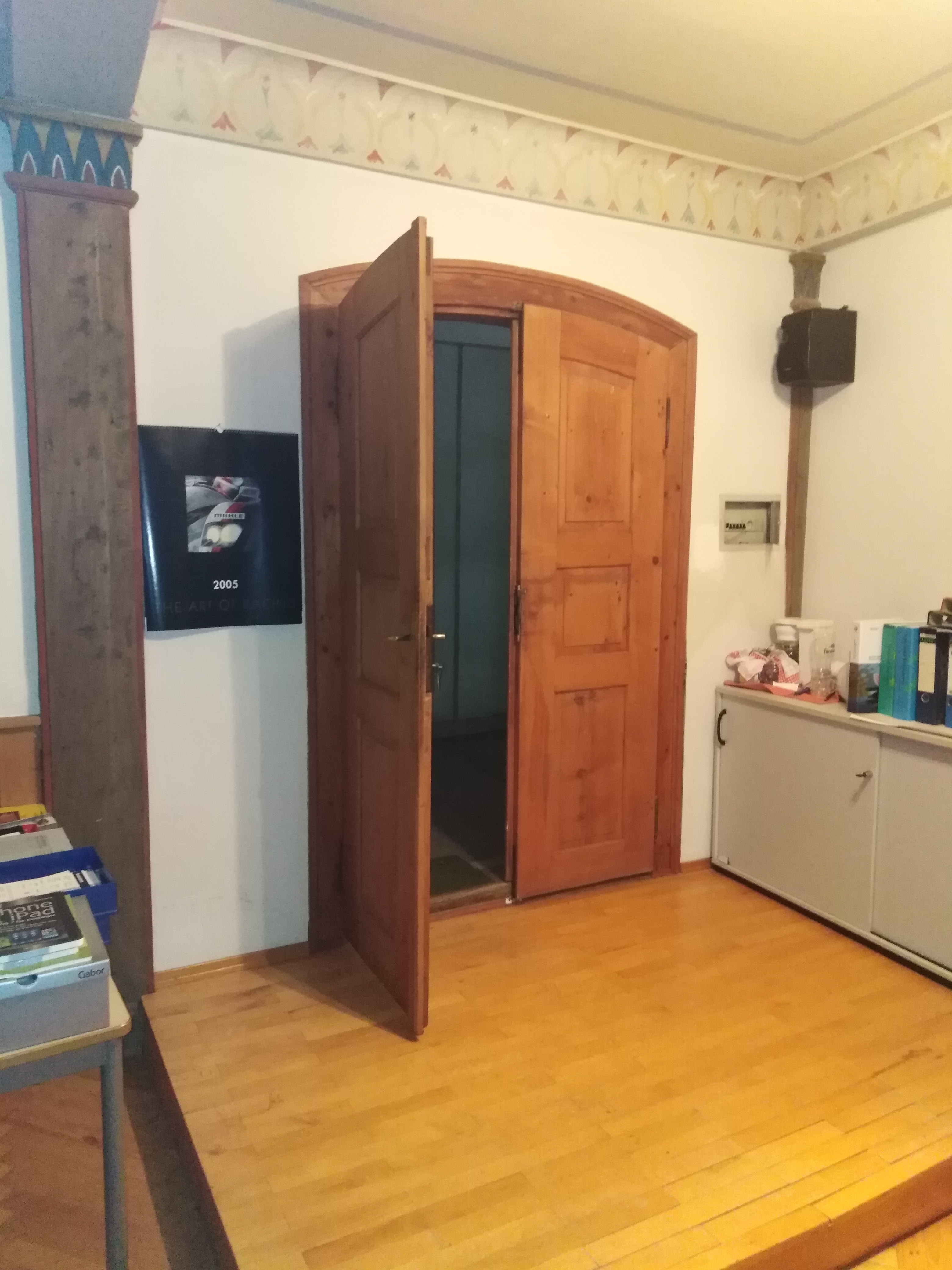 Hölzerne Eingangstür